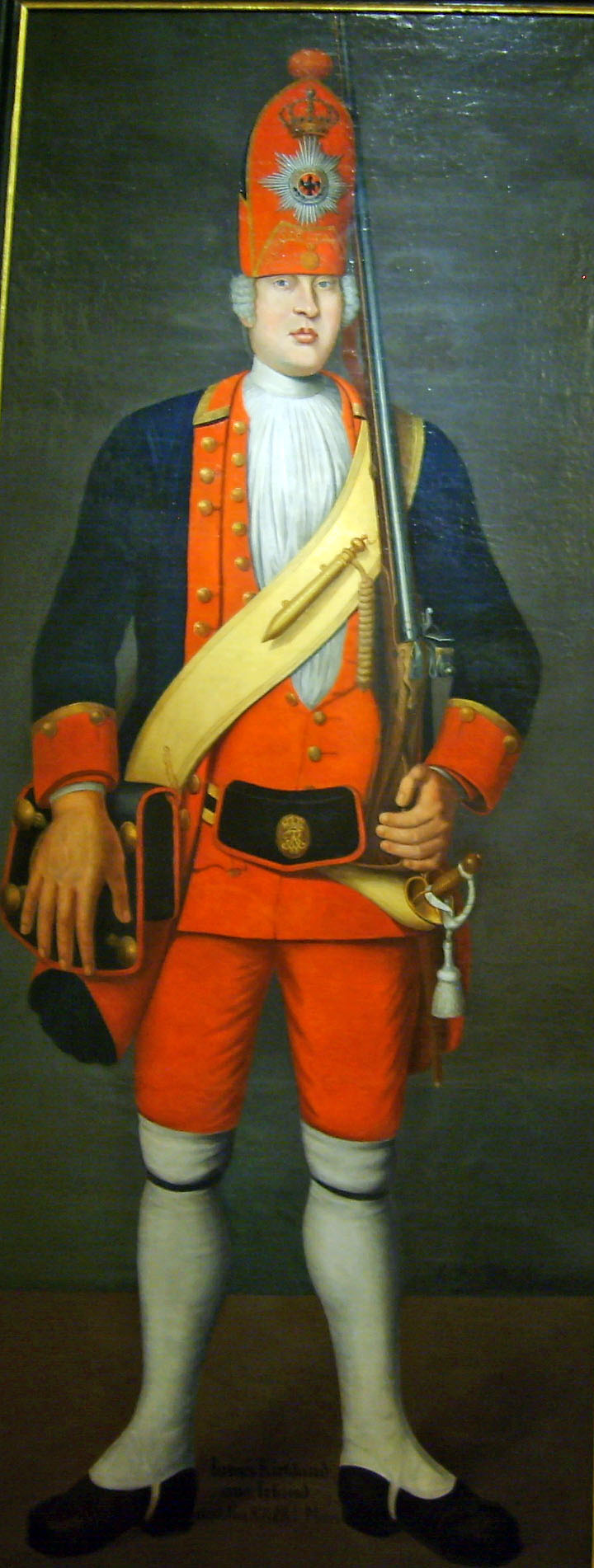 Langer Kerl (Rotes Leibbataillon] der Riesengarde Friedrich Wilhelms I.: James Kirkland aus Irland